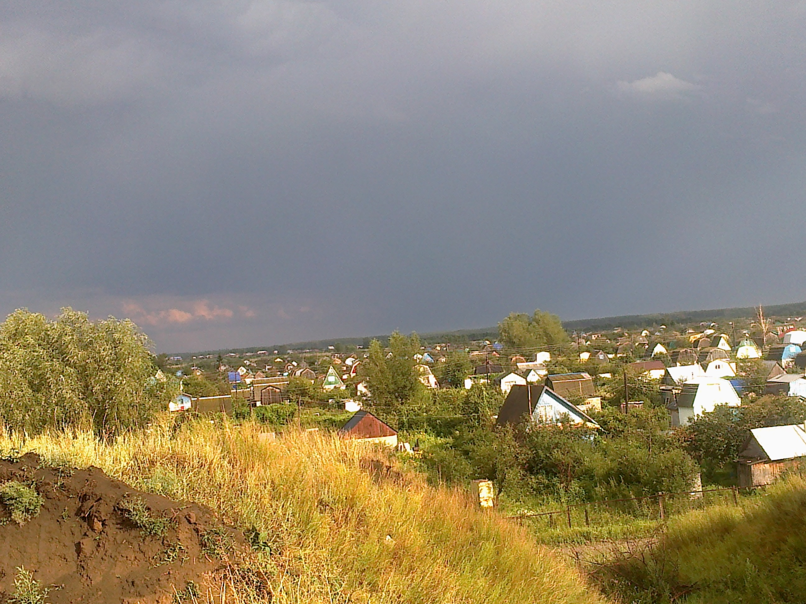 Сады после дождя